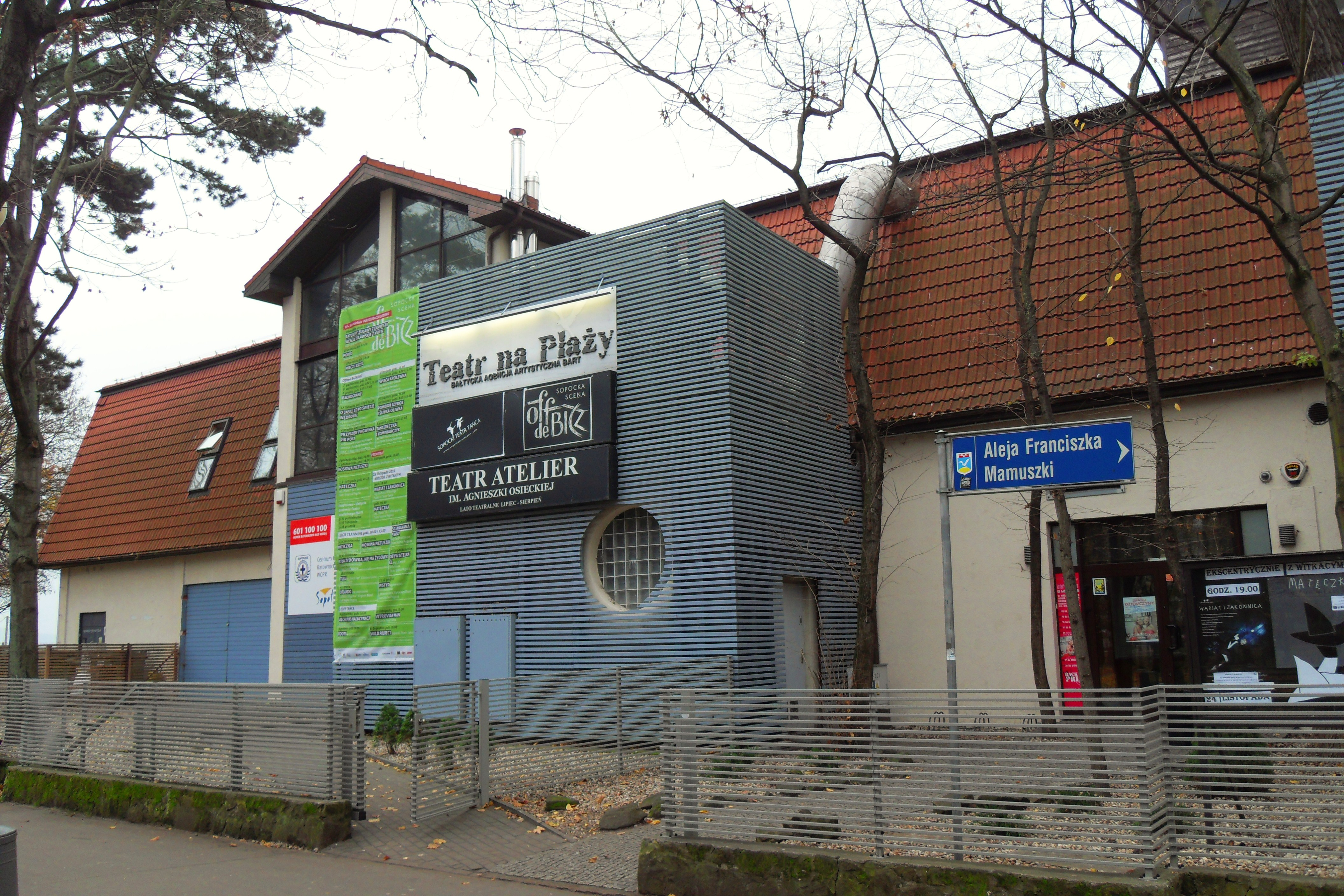 Teatr Atelier im. Agnieszki Osieckiej w Sopocie, al. Mamuszki 2.